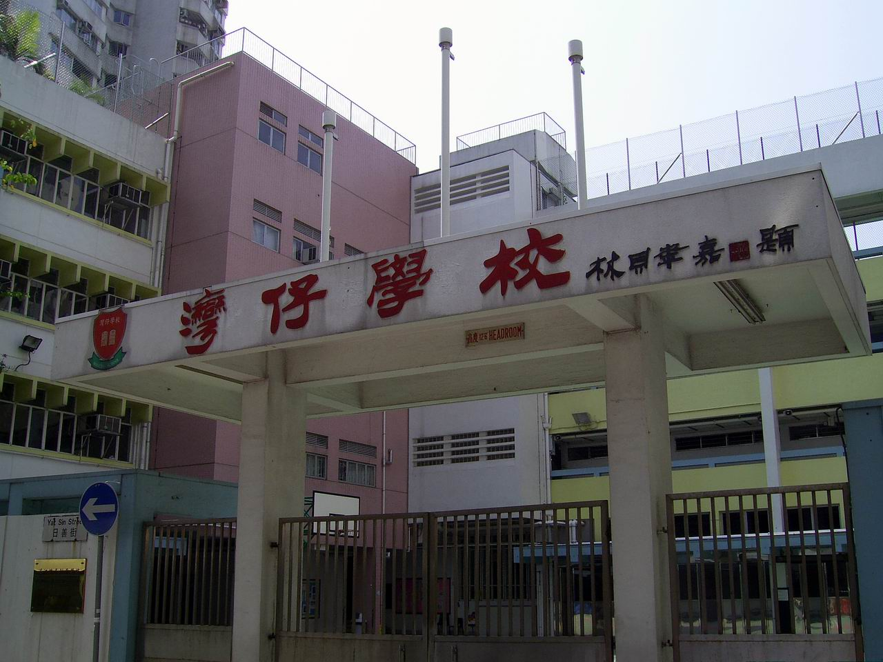 灣仔學校位於愛羣道的入口